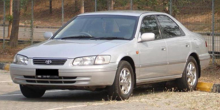 1997-2002 Toyota Camry XV20 2.2 GLX sedan.